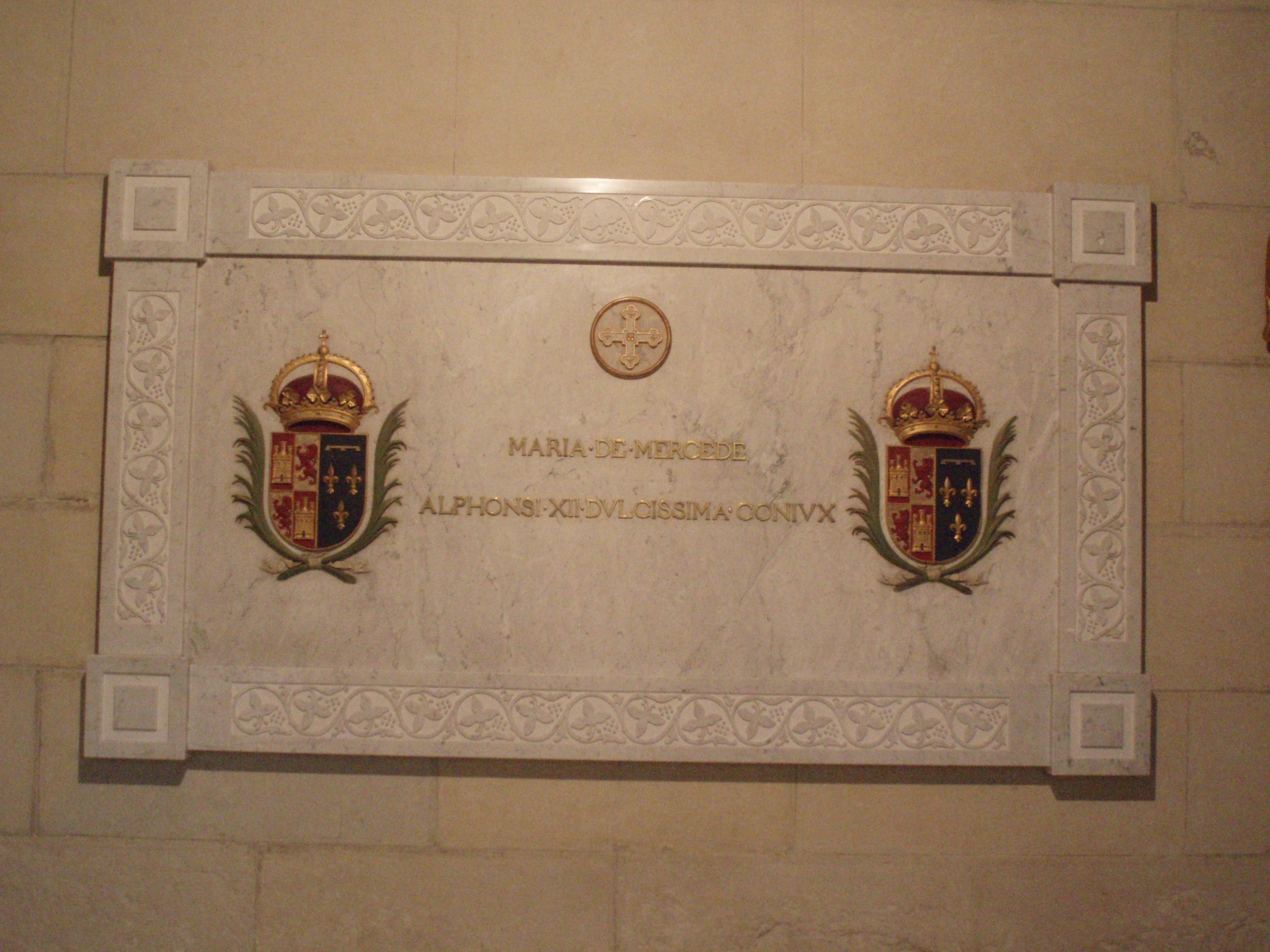 Tumba de la reina María de las Mercedes